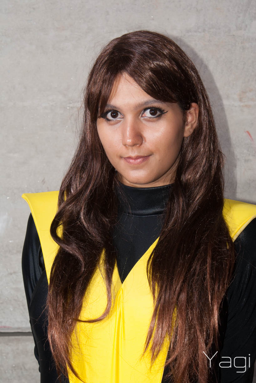 Cosplay da personagem Lince Negra na Comic Con Experience de 2014